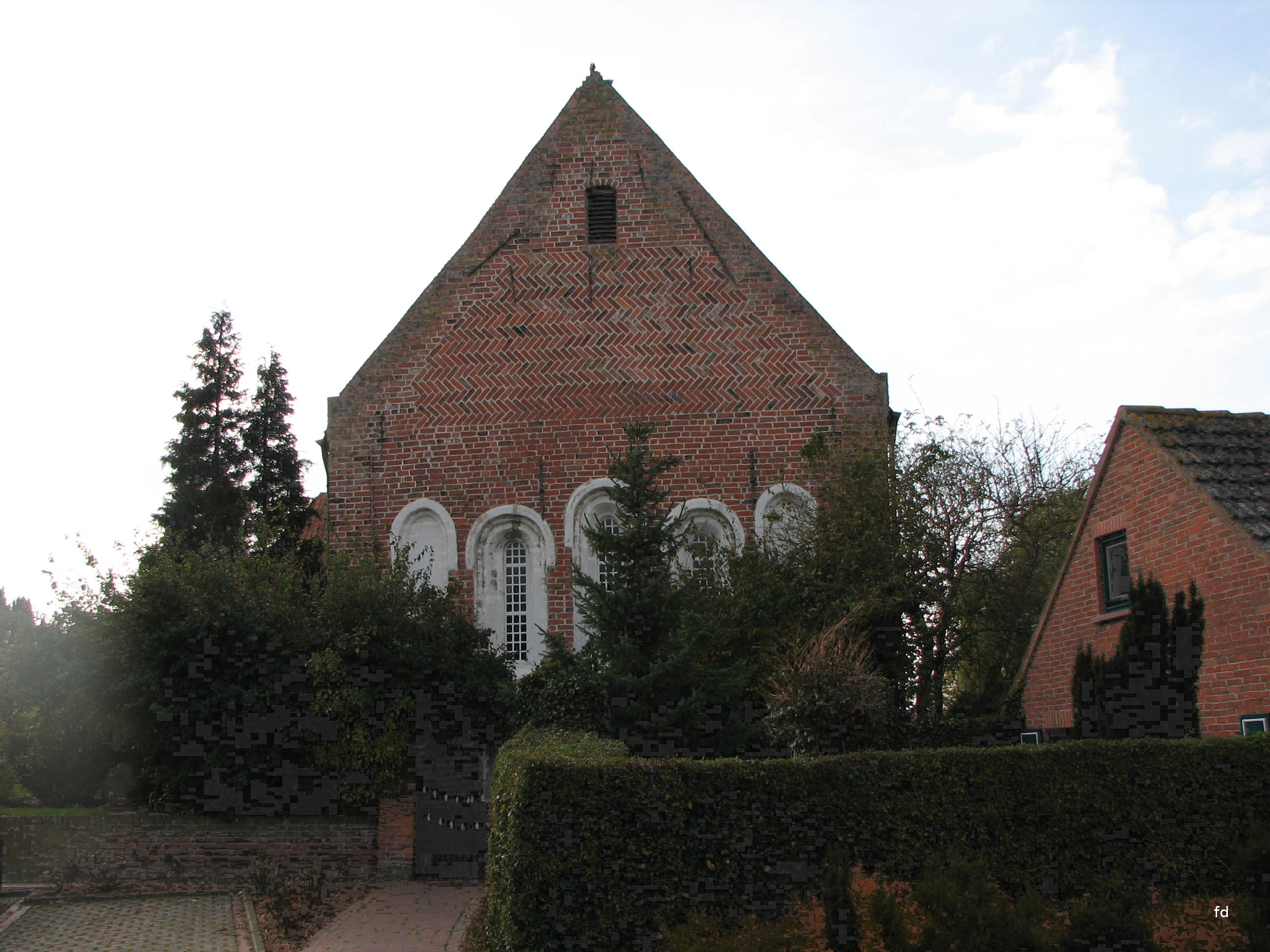 Loquarder Kirche Giebelfront